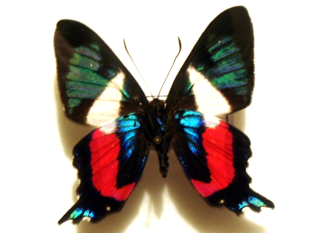 Pensamiento de cuatro colores (Ancyluris formosissima)